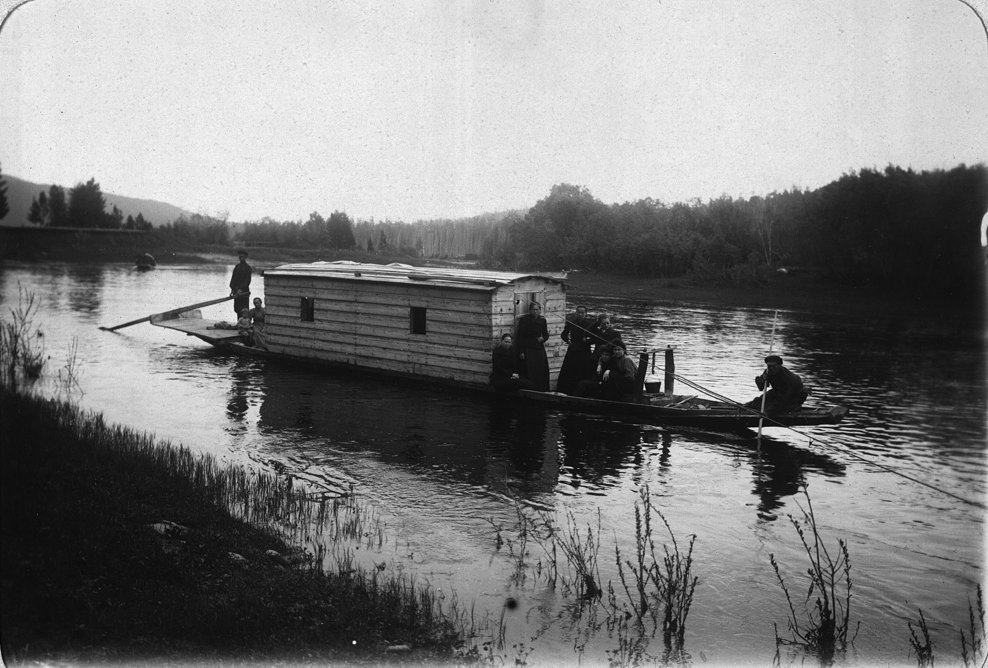 Шитик на Лене